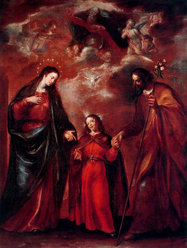 La obra representa a los tres miembros de la Sagrada Familia cristiana.